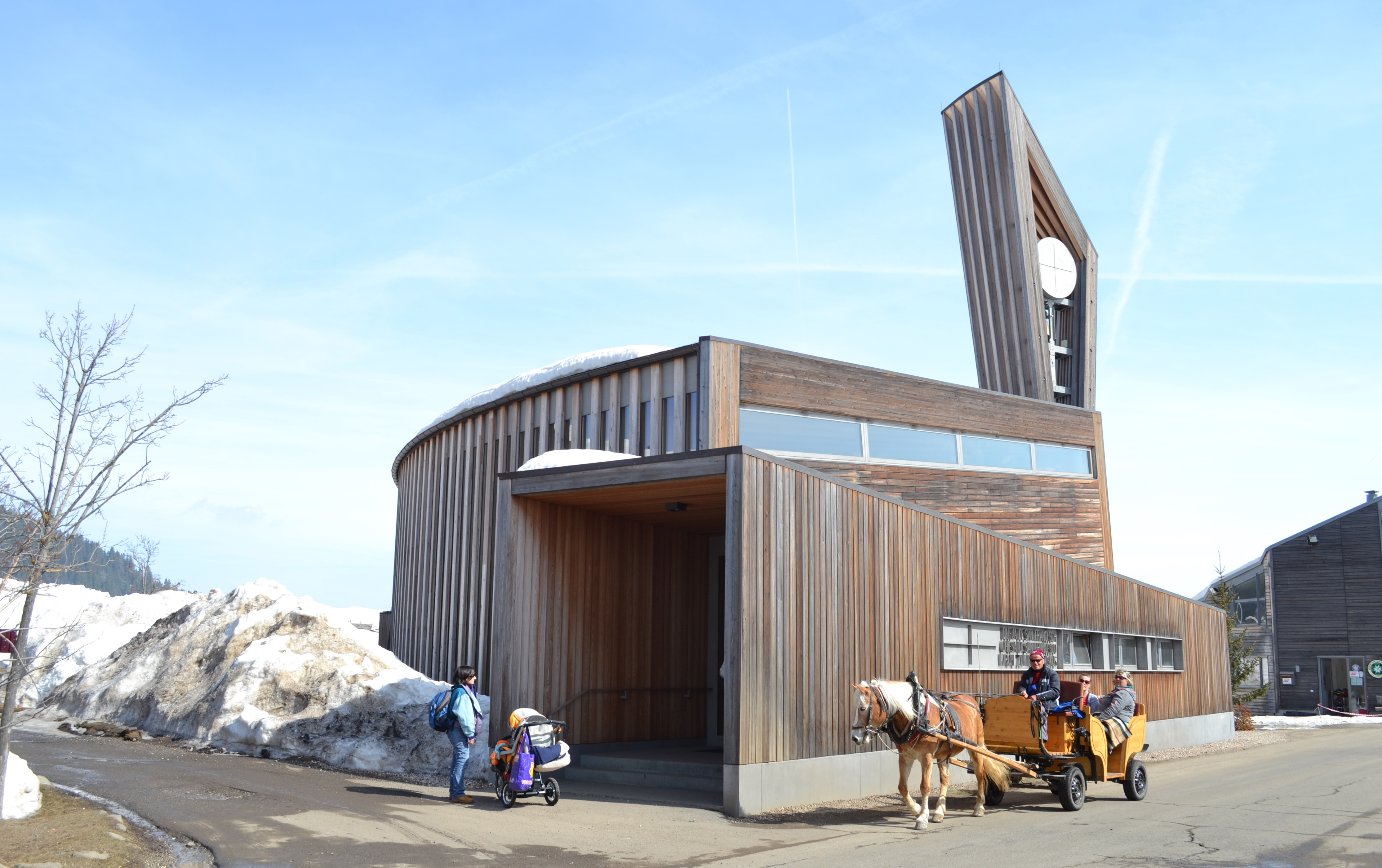 Die neue Kirche auf der Seiser Alm, dem heiligen Franziskus geweiht